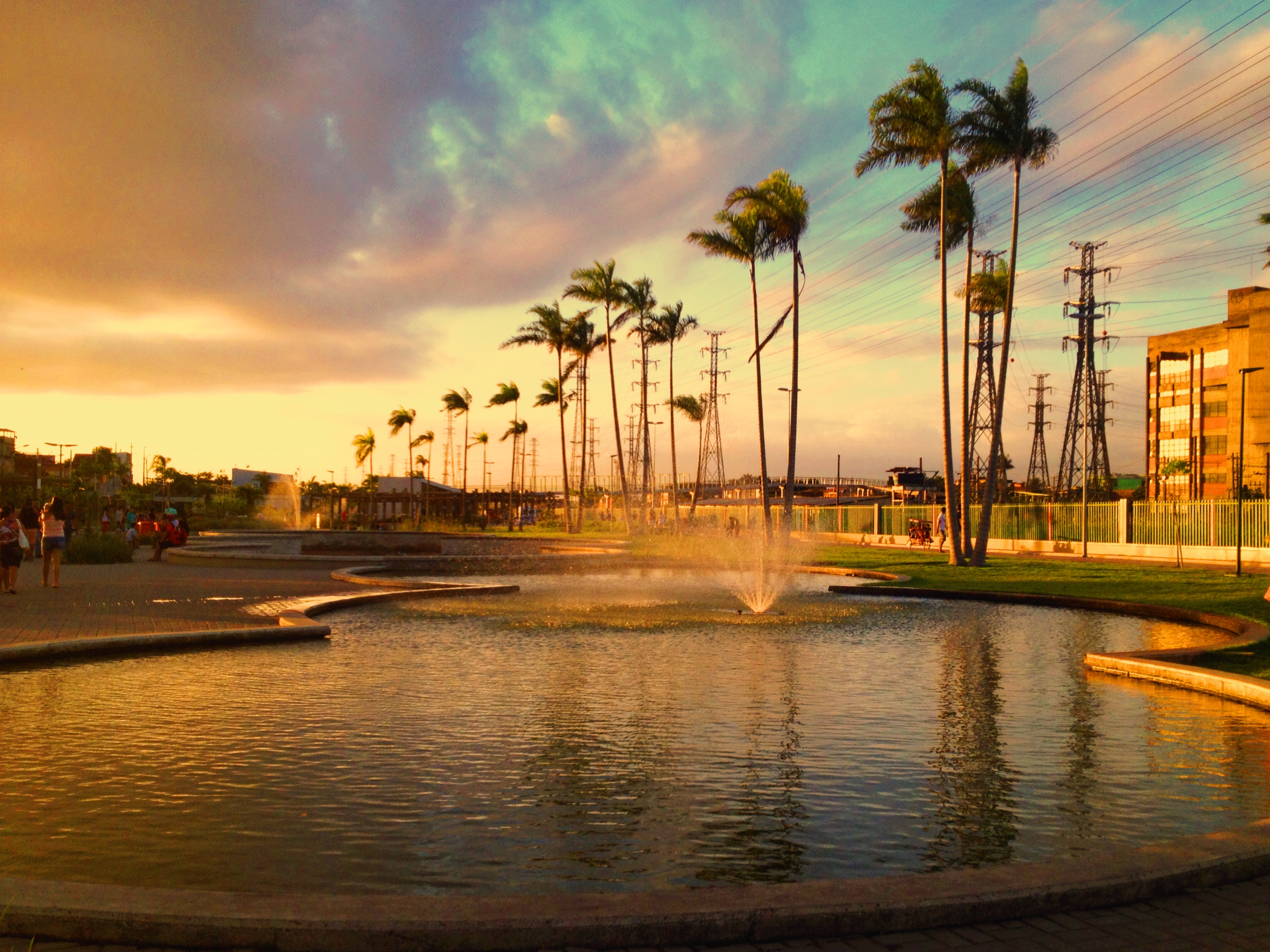 Um belíssimo entardecer no Parque Madureira.